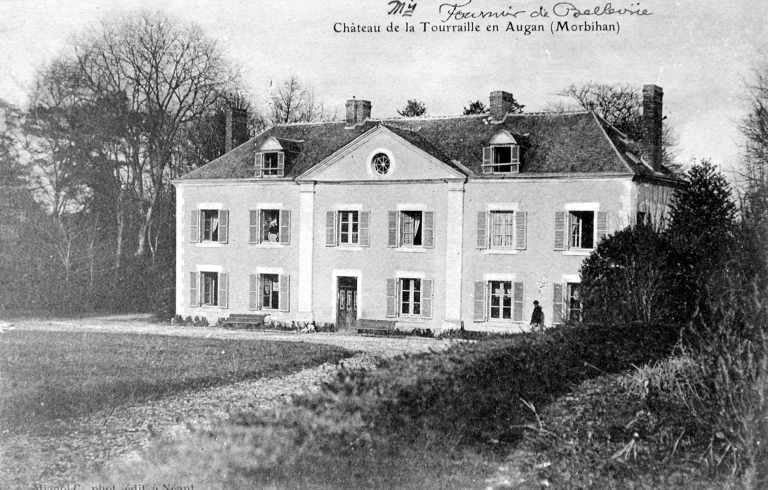 Carte postale ancienne publiée par l'inventaire du patrimoine de Bretagne